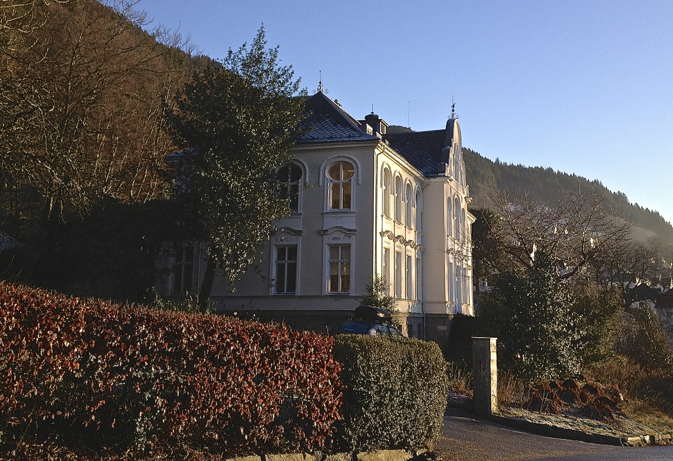 Barnehjemmet sett fra nordsiden.